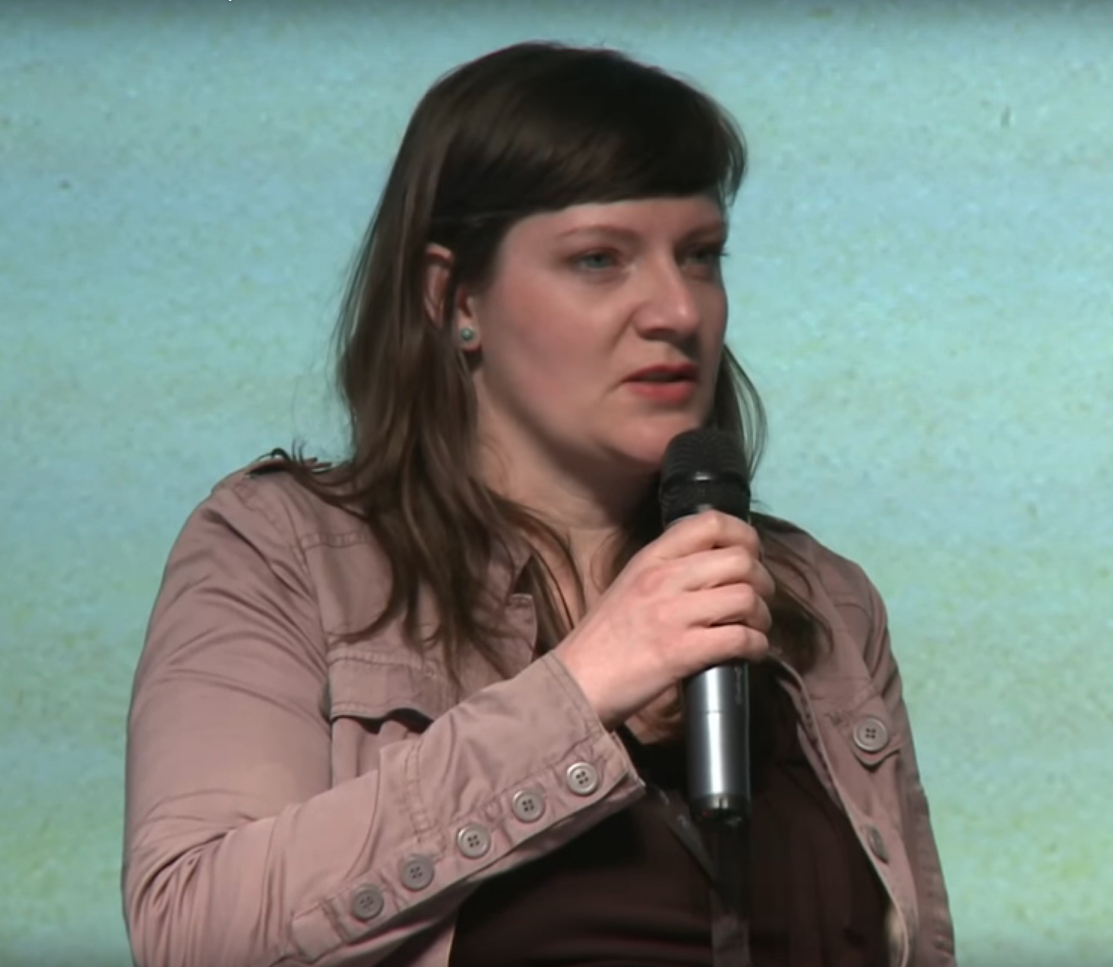 Patricia Cammarata, deutsche Autorin, Bloggerin